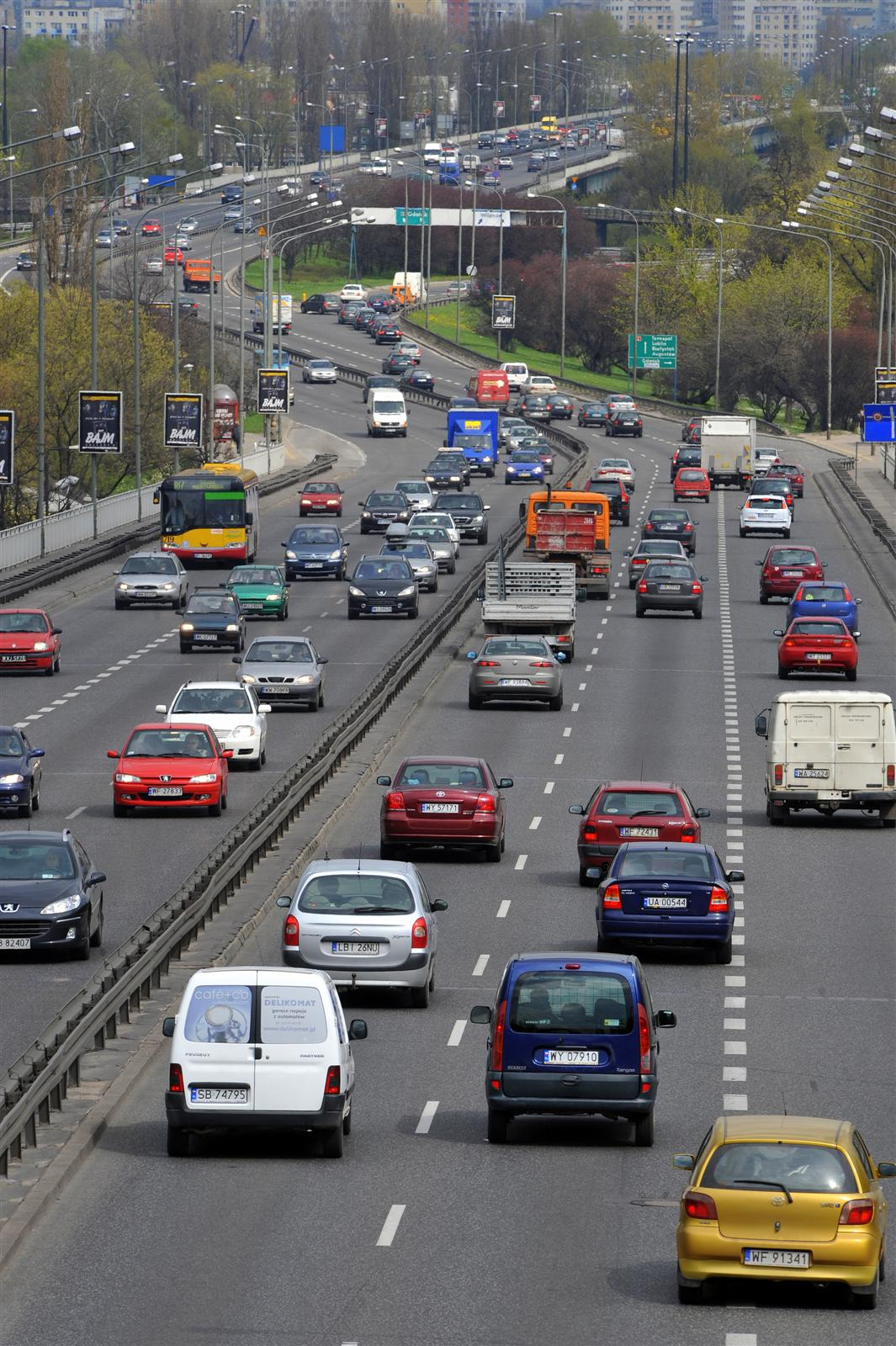 Trasa Łazienkowska w Warszawie